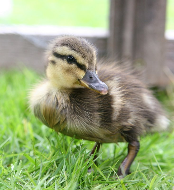 Stockentenküken